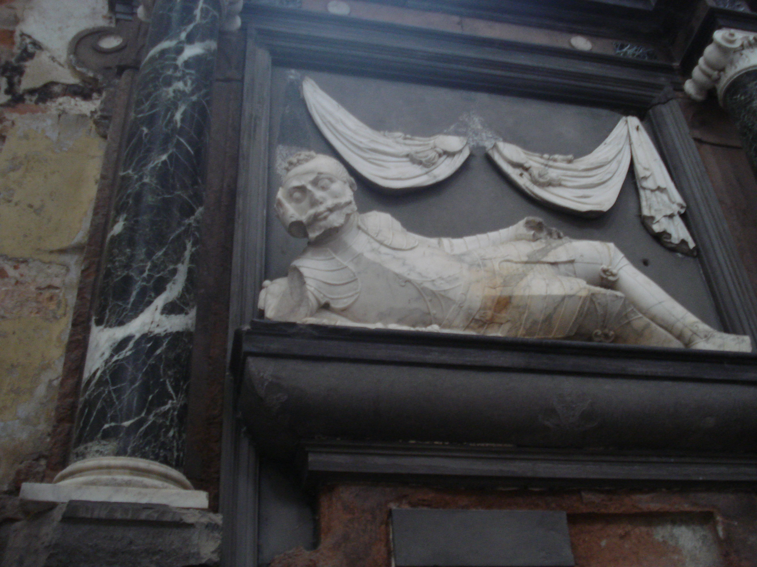 The Church of Saint Francis and Saint Bernardino in Vilnius (Šv. Pranciškaus ir Bernardino, arba Bernardinų, bažnyčia; Kościół Śww. Franciszka i Bernardyna; Maironio 10). Tombstone for Piotr Wiesiołowski (d. 1556). Marmurinis barokinis Petro Veselovskio antkapis. Fragmentas. Nagrobek Piotra Wiesiołowskiego (zmarł 1556), fundowany w 1634 r.